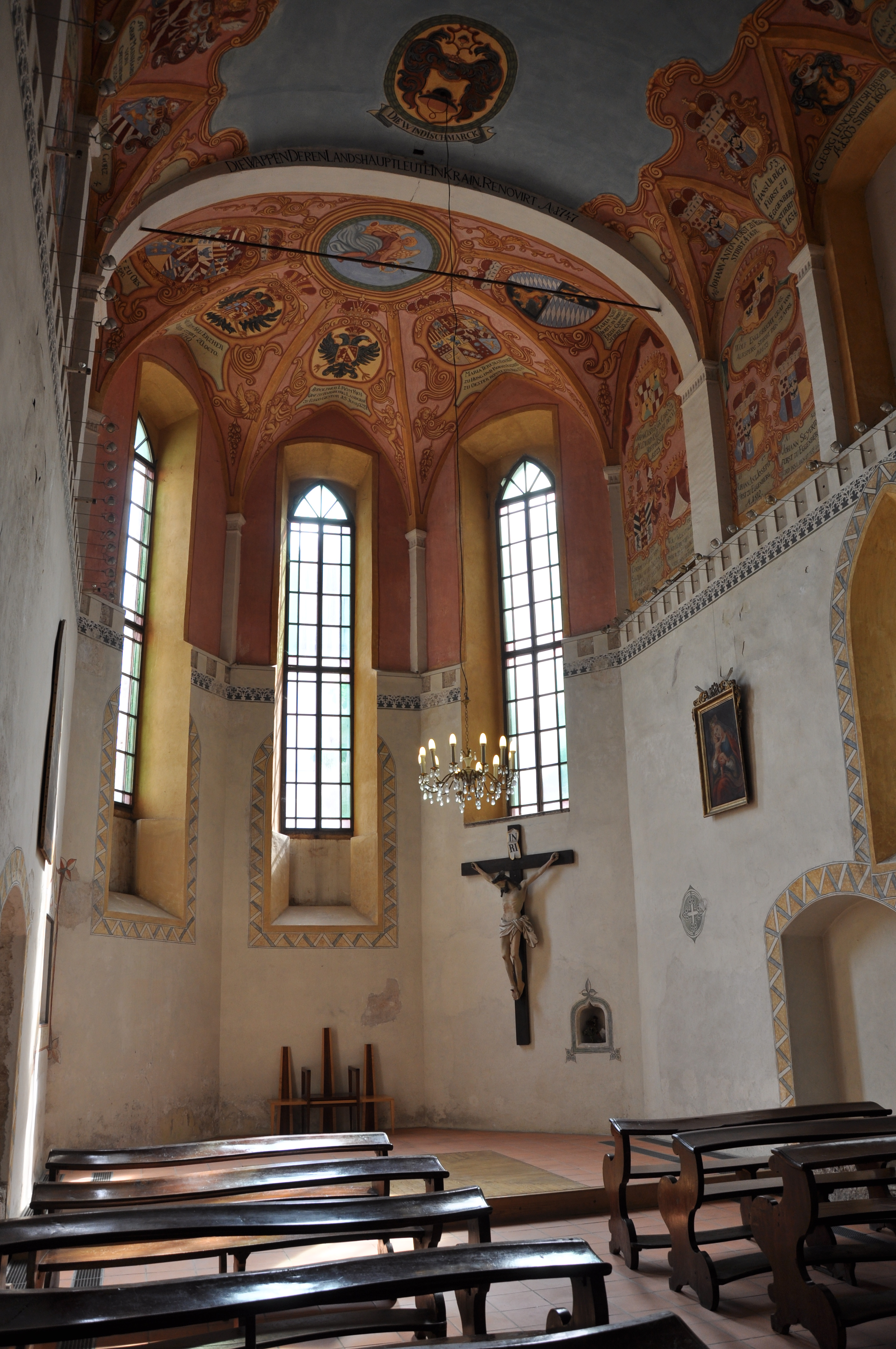 __DSC_0359_Ljubljana Castle